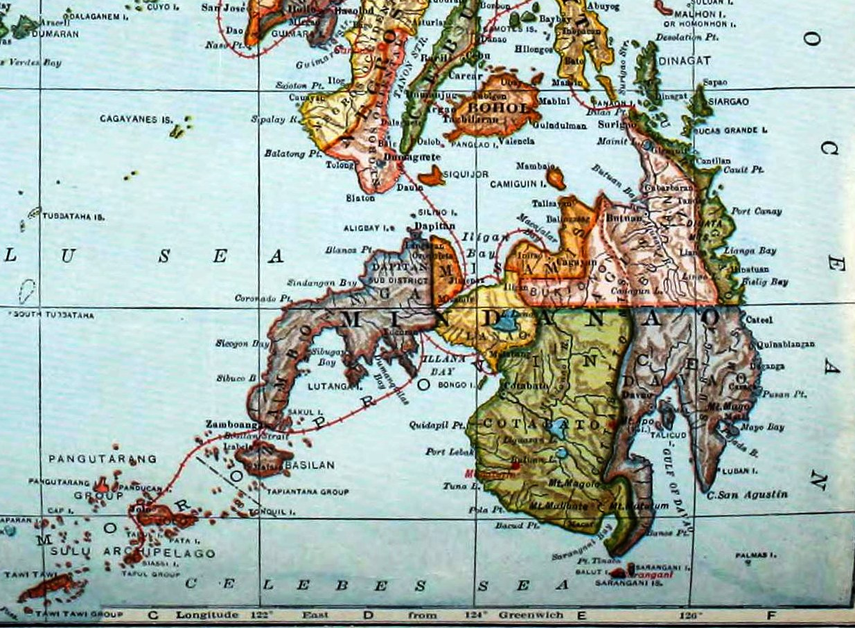 Isla de Mindanso y Archipiéñalago de Joló, CFragmento del Collier's New Encyclopedia, v. 7, 1921, facing p. 223.